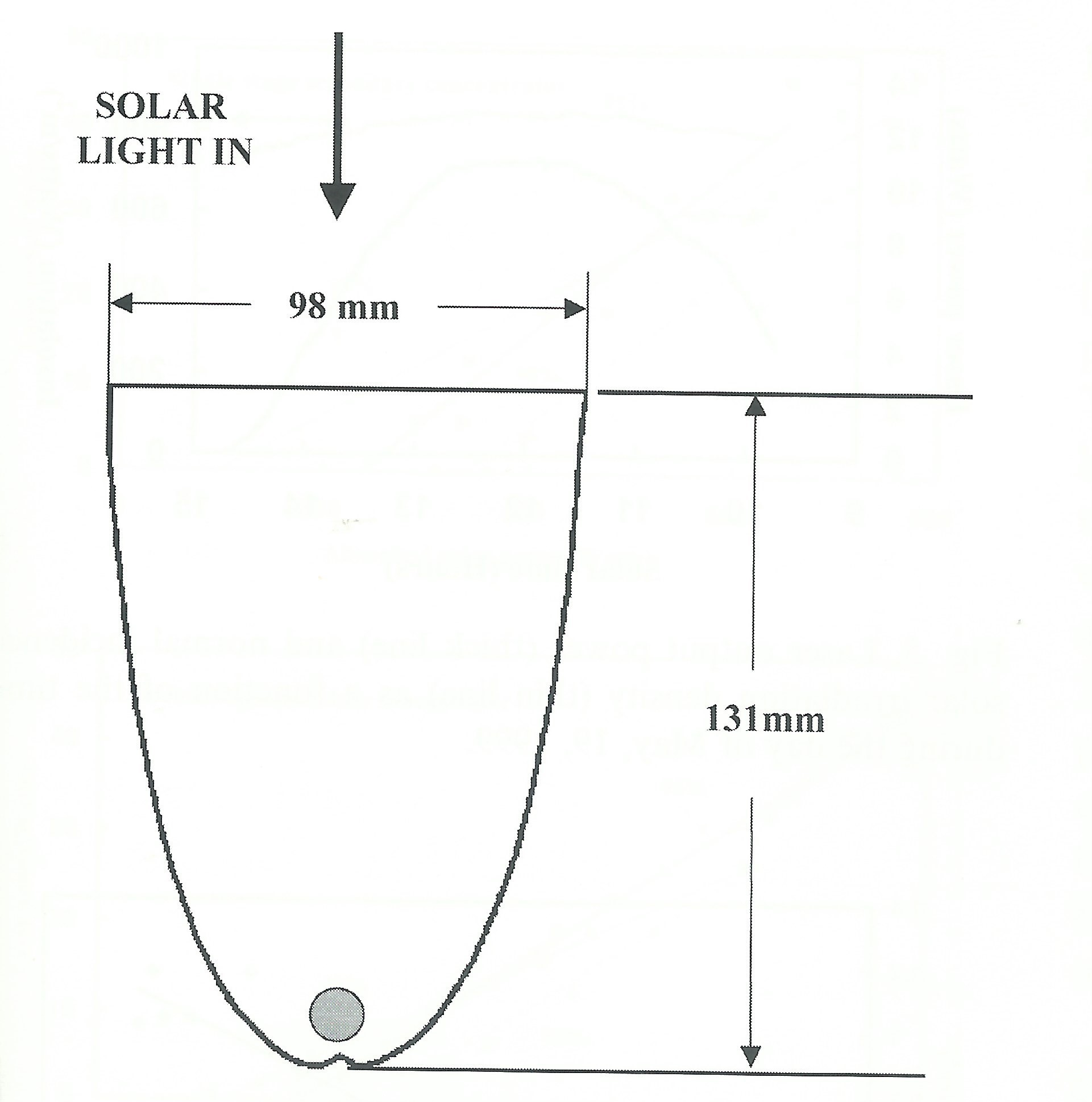 רכיב של אופטיקה לא-מדמה לשם ריכוז אור שמש על מוט לייזר המשובץ כתווך הלזירה של לייזר שאוב-שמש. הרכיב נבנה במעבדה הלאומית לאנרגיה מתחדשת בקולורדו , ארה"ב לפי תכנון של דיויד ג'נקינס מקבוצת פרופ' וינסטון באוניברסיטת שיקגו.